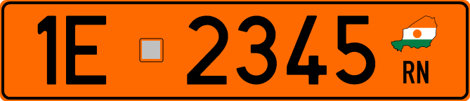 Схематичне зображення номерного знаку